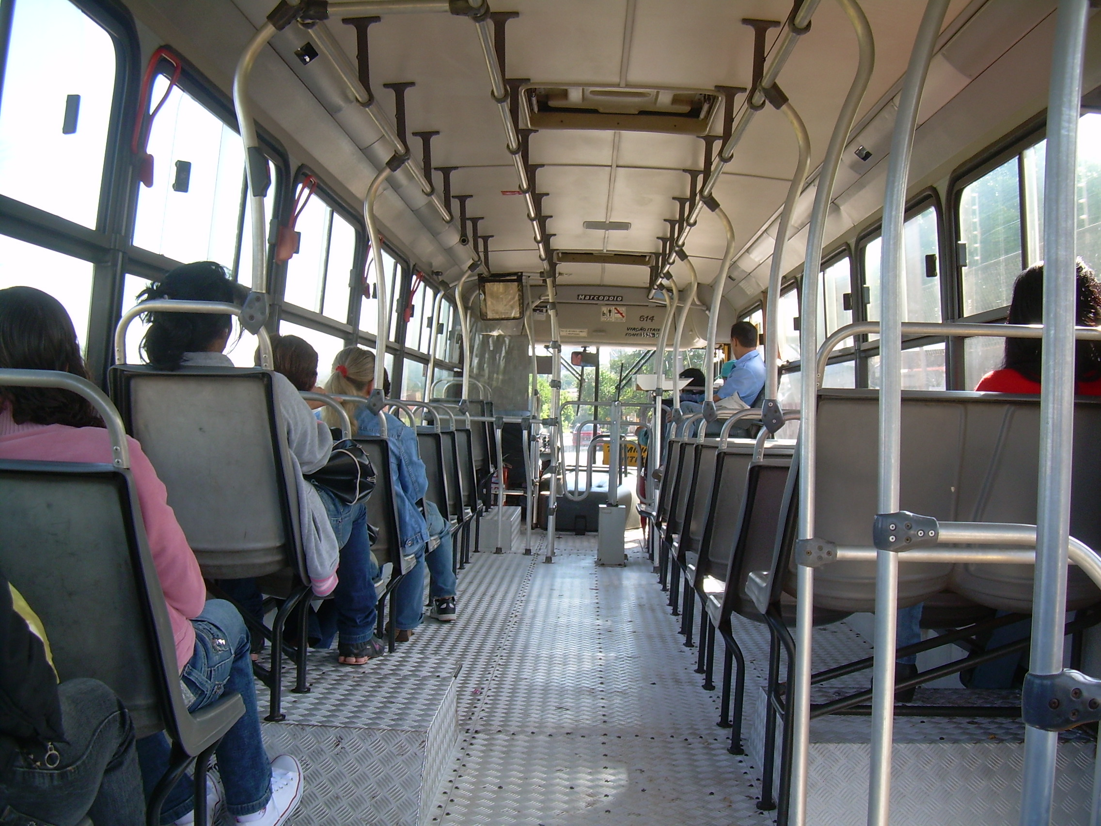 Transporte publico em Foz, linha Jardim Guarapuava